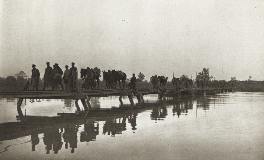 Sztab I Brygady Legionów Polskich przechodzi przez Bug.